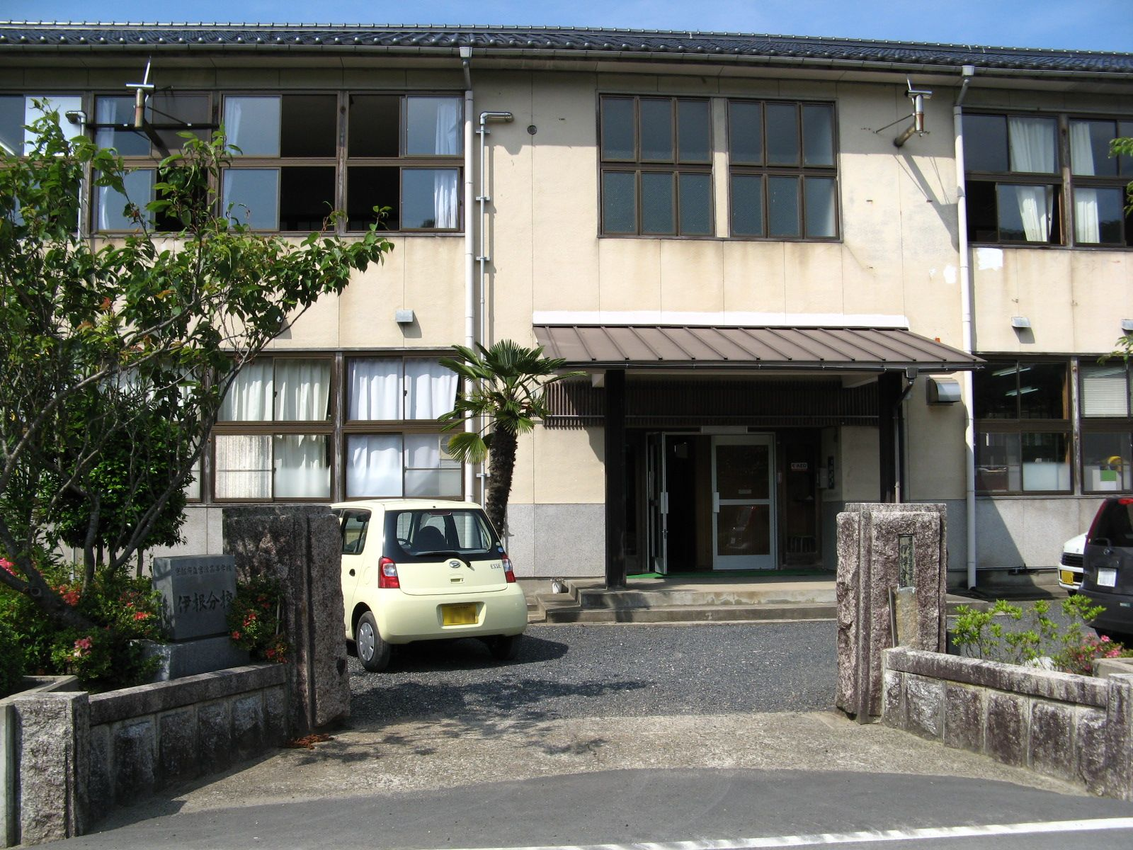 京都府立宮津高等学校伊根分校